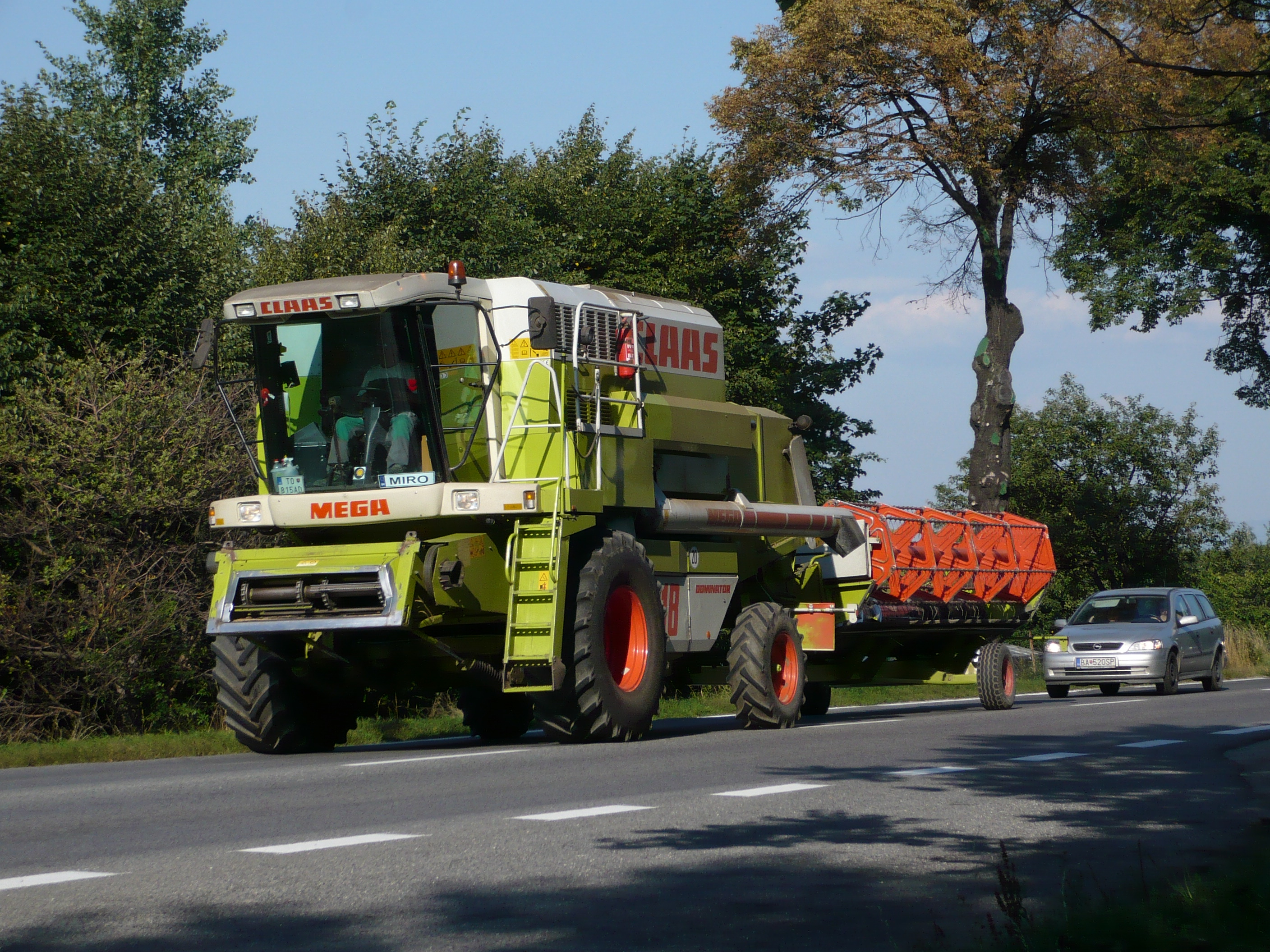 Kombajn Claas Dominator 218 Mega, Slovakia – Kombajn v bežnej cestnej premávke má žaciu lištu uloženú na vozíku, ktorý ťahá za sebou